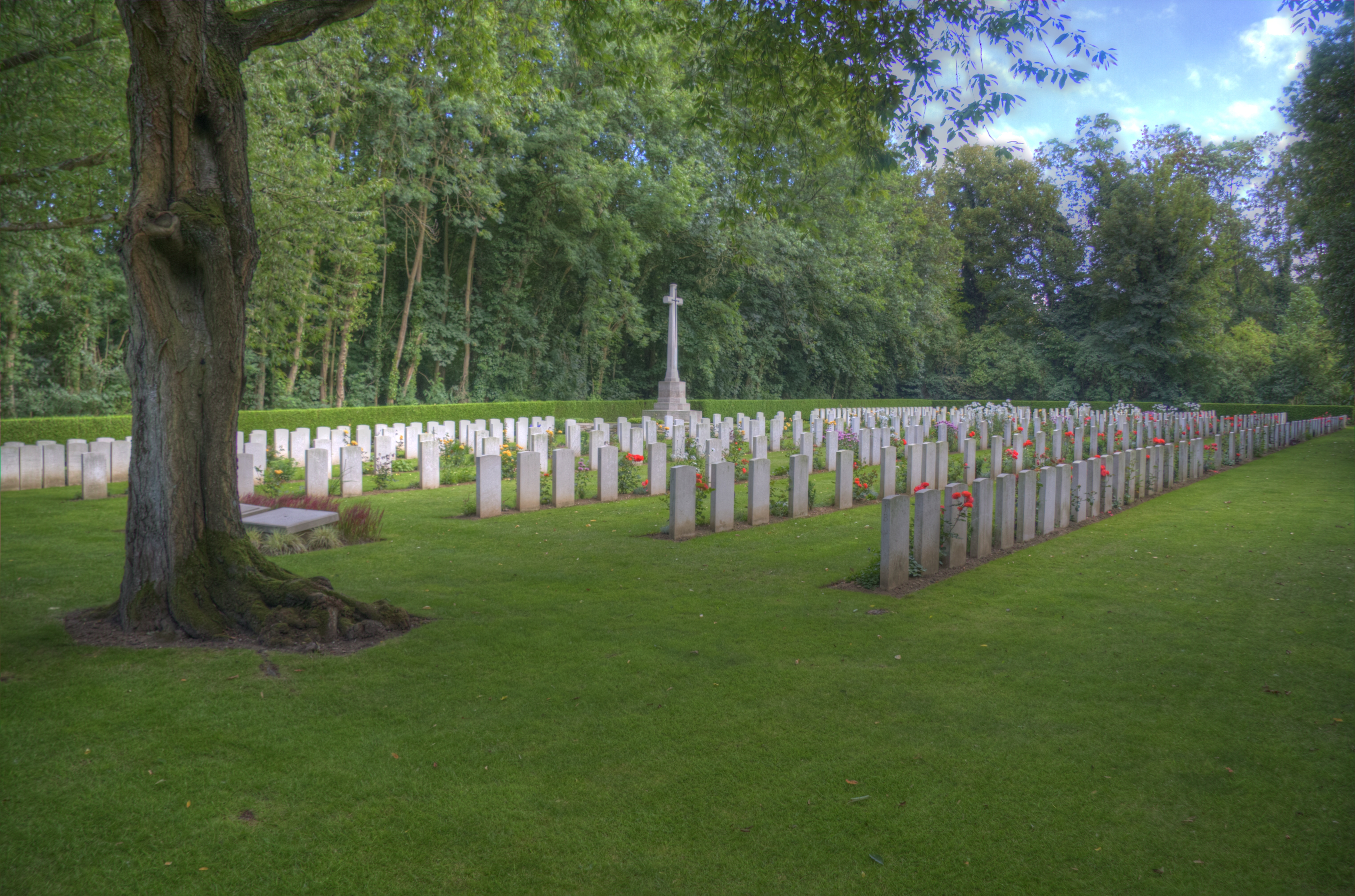 Le cimetière Anglais d'Agny